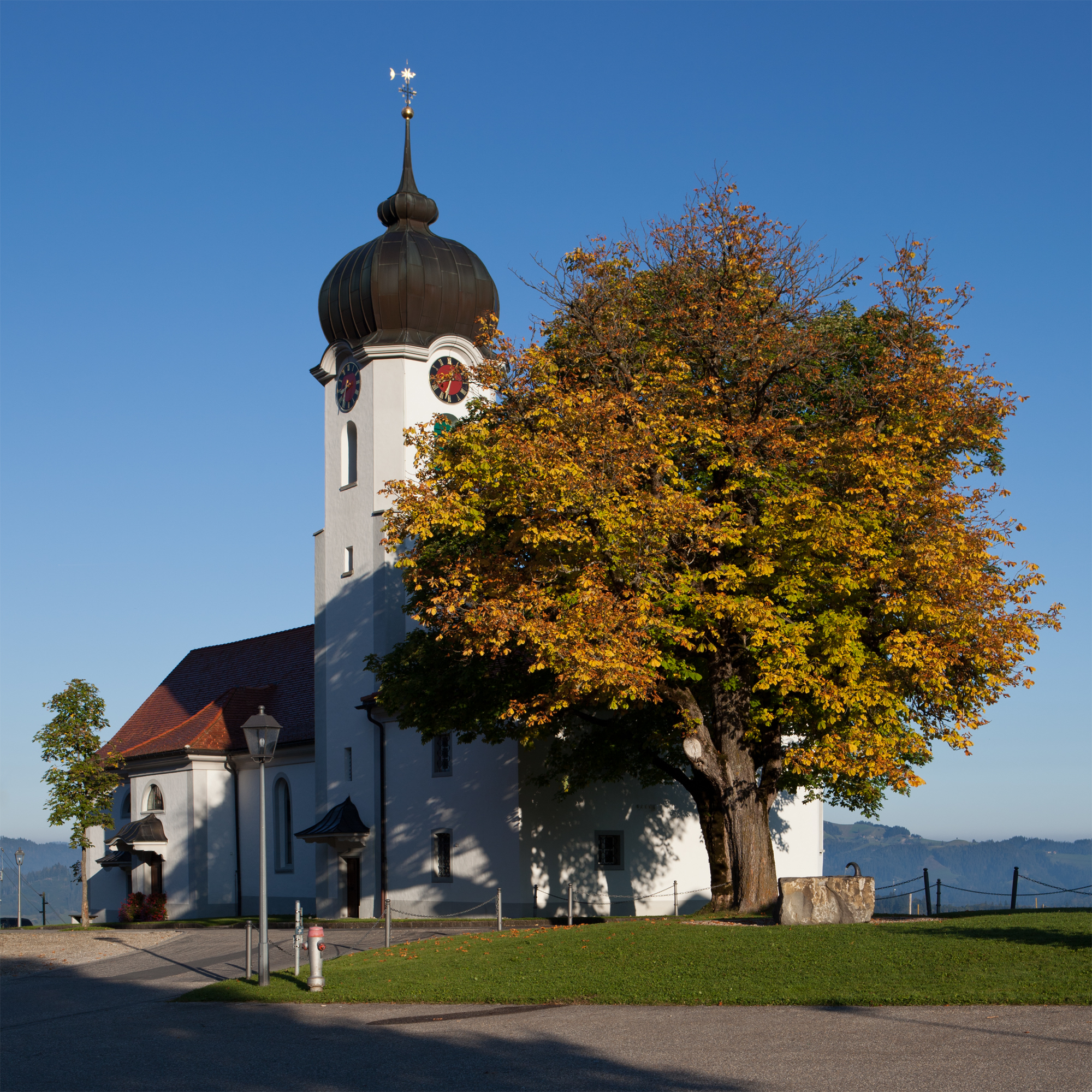 Wallfahrtskirche Heiligkreuz ob Hasle im Entlebuch